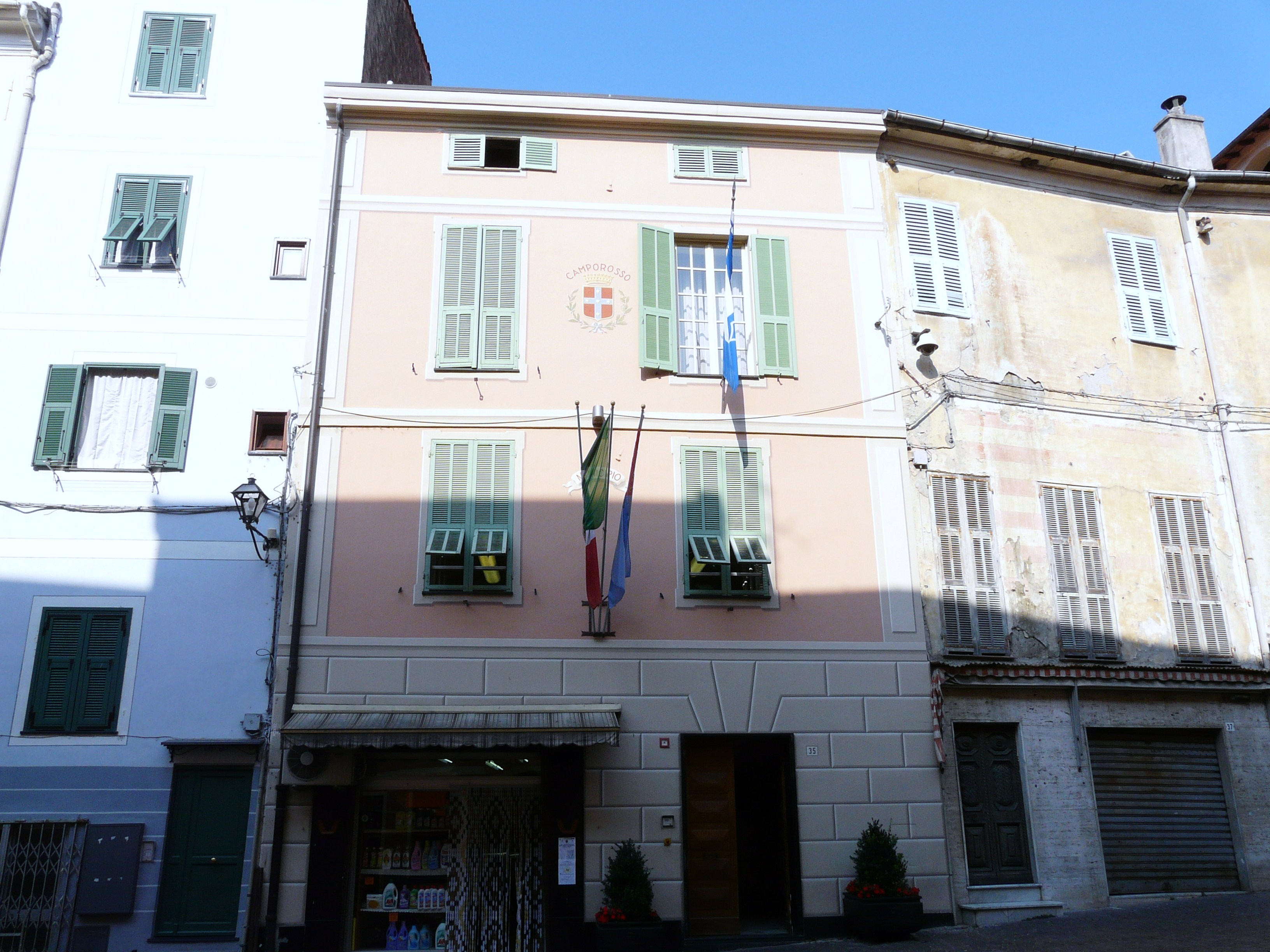 Municipio di Camporosso, Liguria, Italia